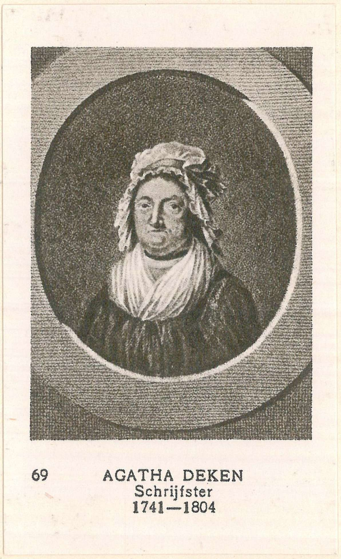 69 Agatha Deken, Schrijfster, 1741-1804. Vaderlandse Historie 2 (1926)